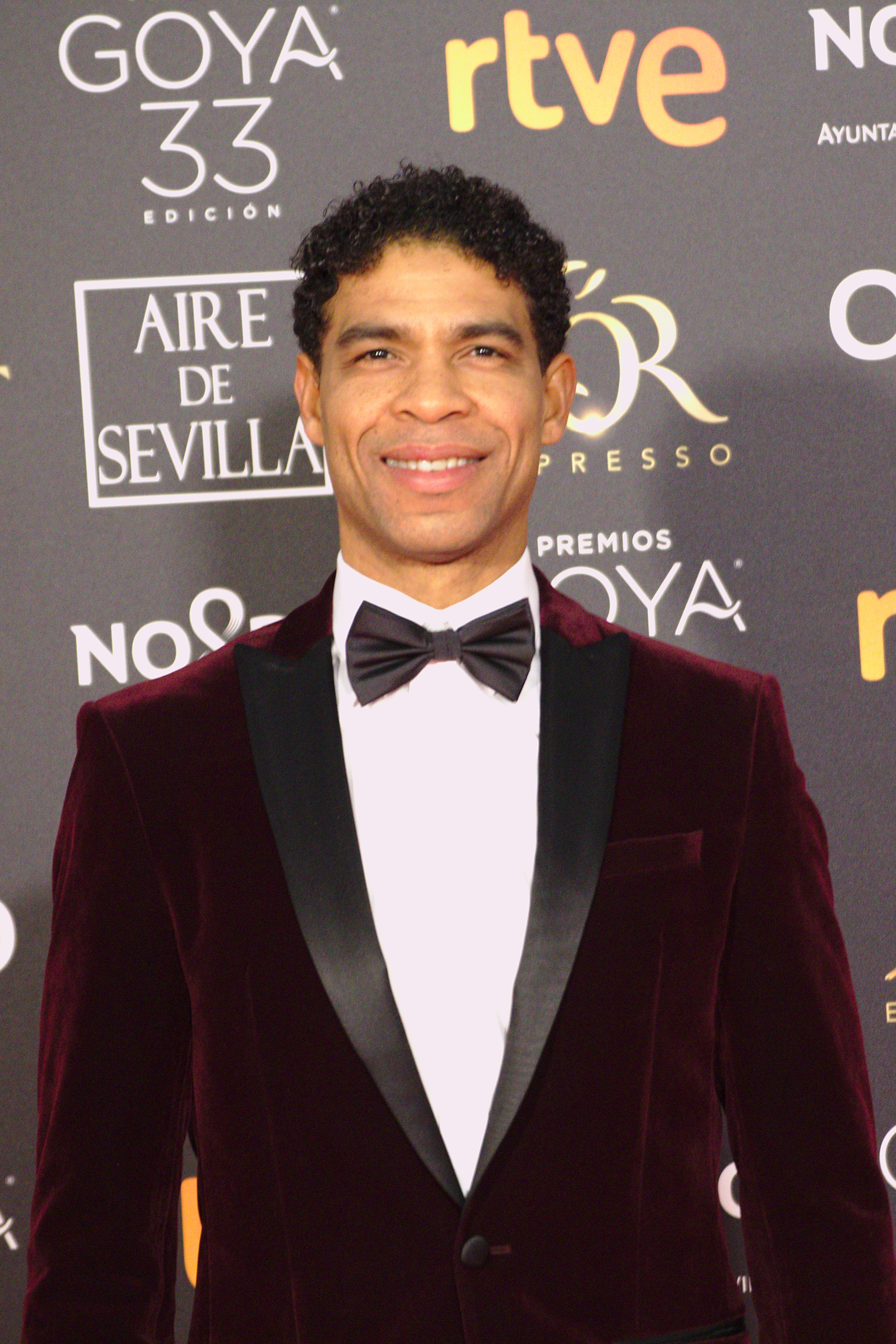 Carlos Acosta en la alfombra roja de los Premios Goya celebrados en Sevilla en febrero 2019